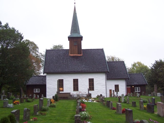 Nesodden kirke i Nesodden kommune, Akershus, Norway